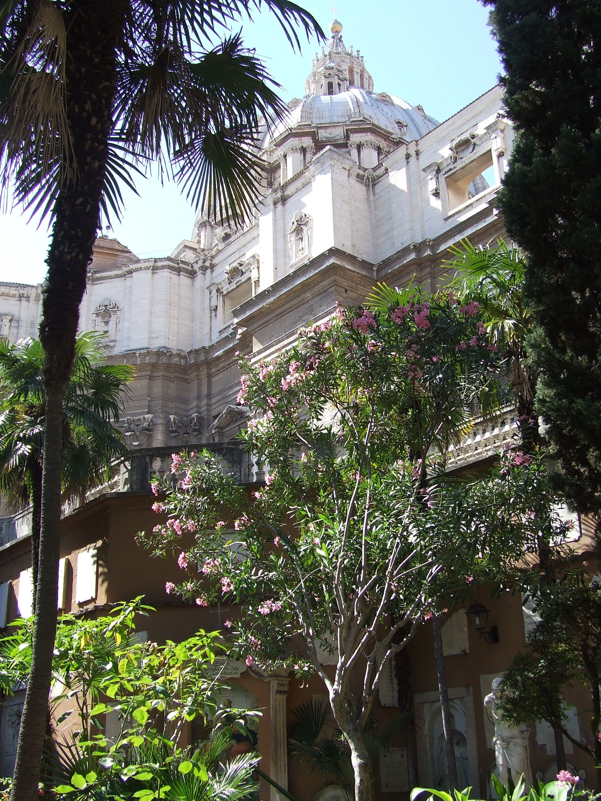 Campo Santo Teutonico - Eine grüne Oase